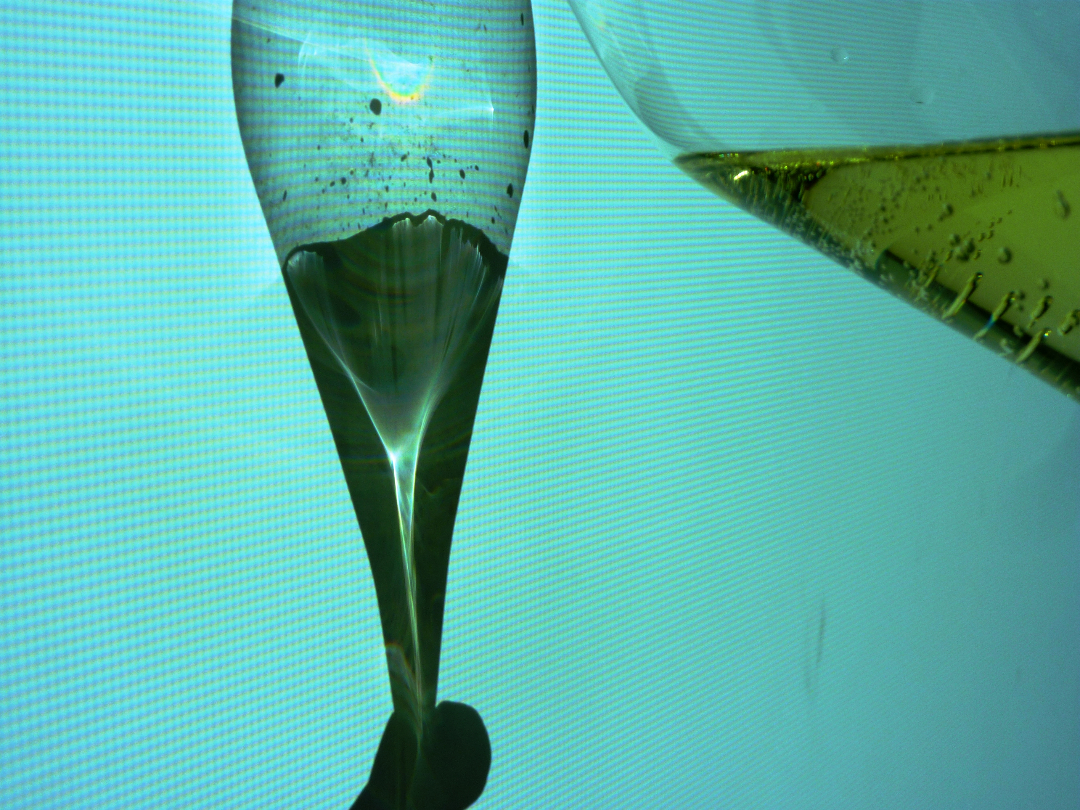 Couleur du champagne Charles Heidsieck à l'Alliance française de Wuhan (